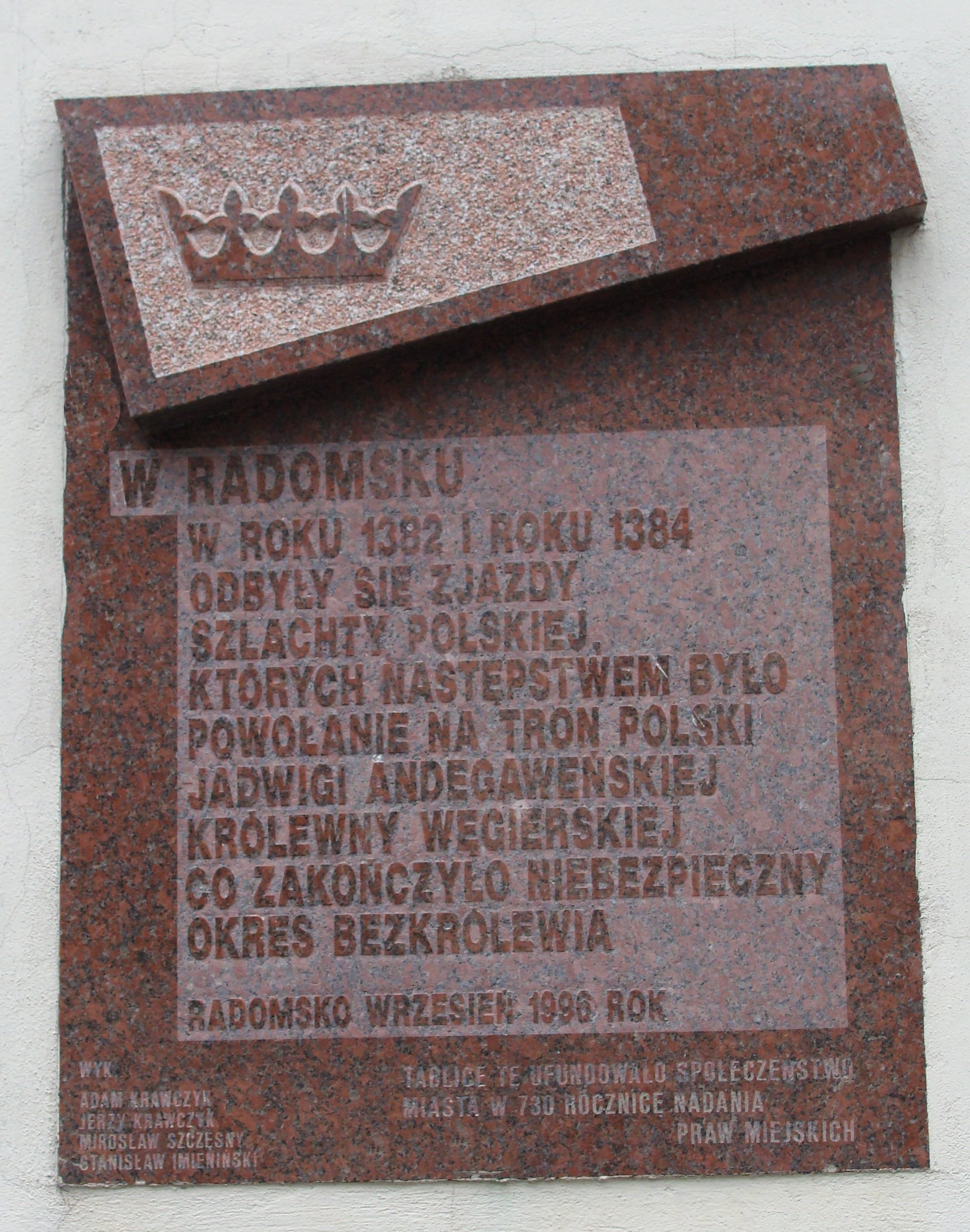 Tablica upamiętniająca zjazd szlachty w Radomsku, w 1384 r.